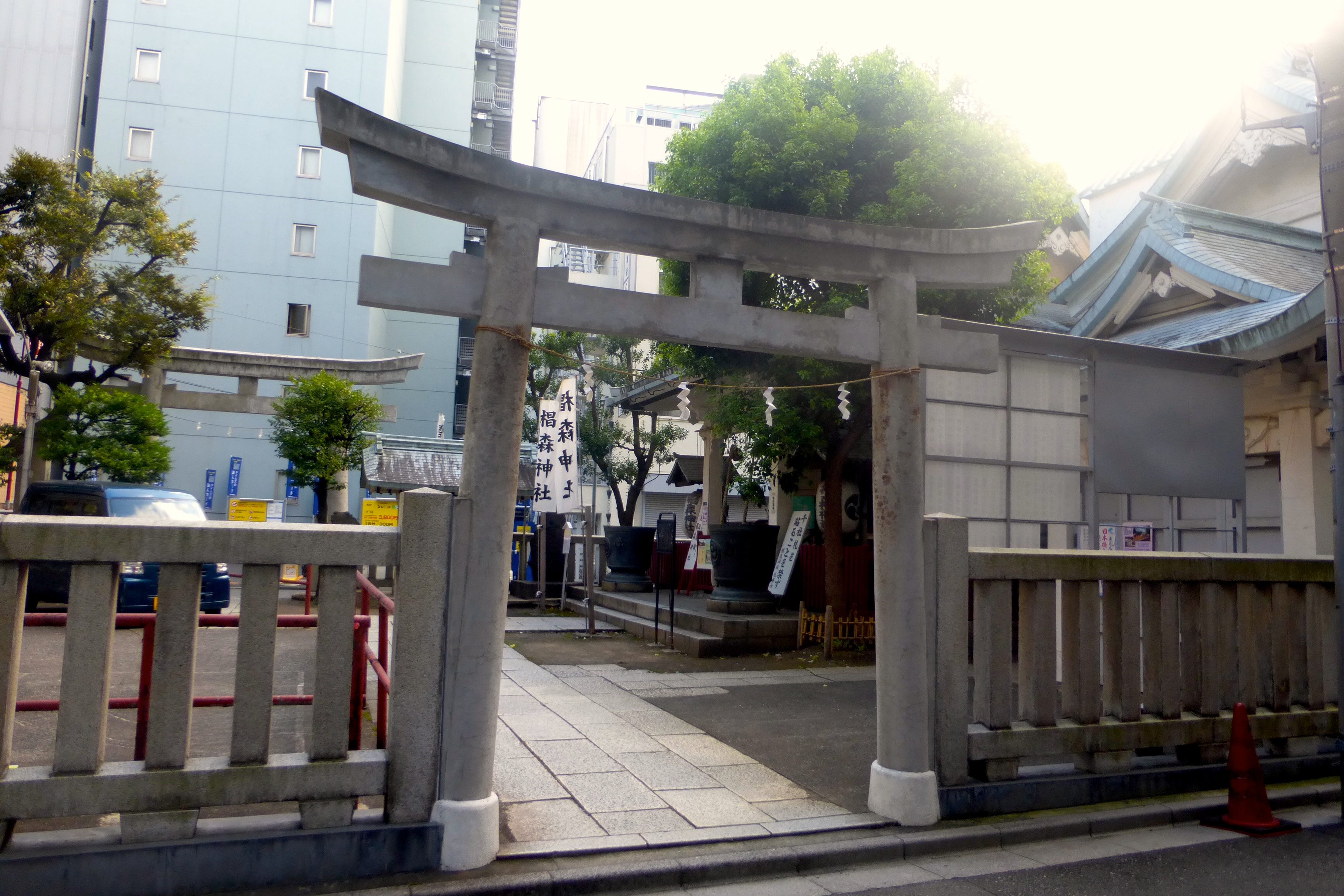 椙森神社（すぎのもりじんじゃ, Suginomori shrine）は、東京都中央区日本橋堀留町にある神社。